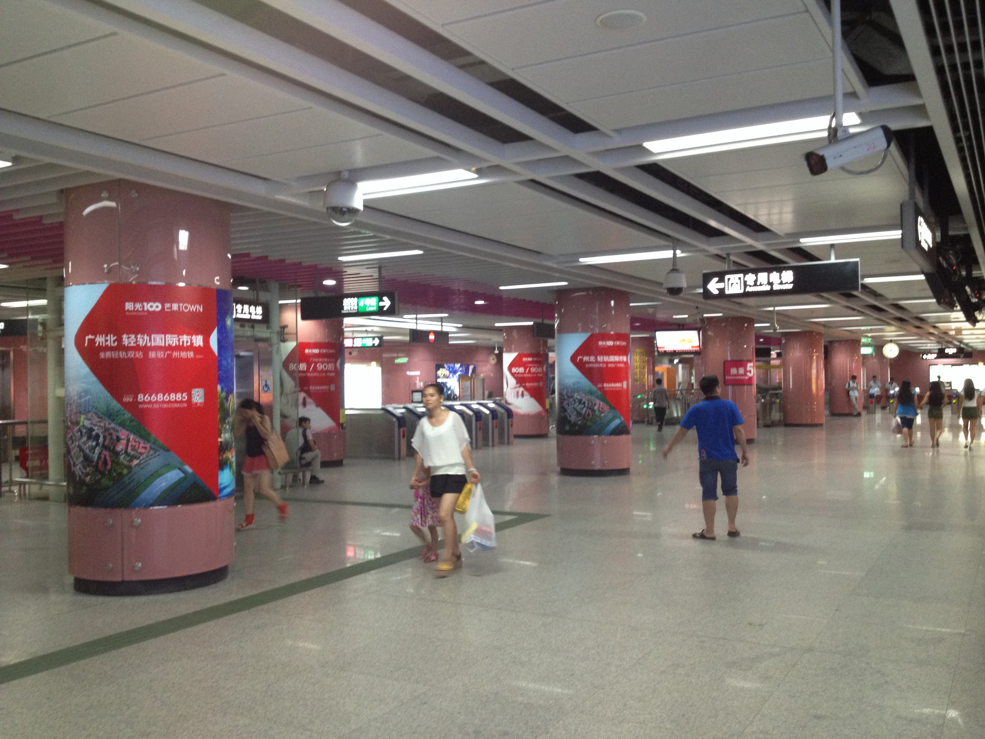 广州地铁车陂南站车站站厅